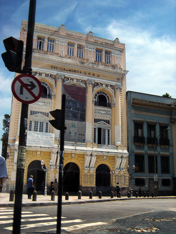 Escola de Música da Universidade Federal do Rio de JaneiroEscola de Música - UFRJ